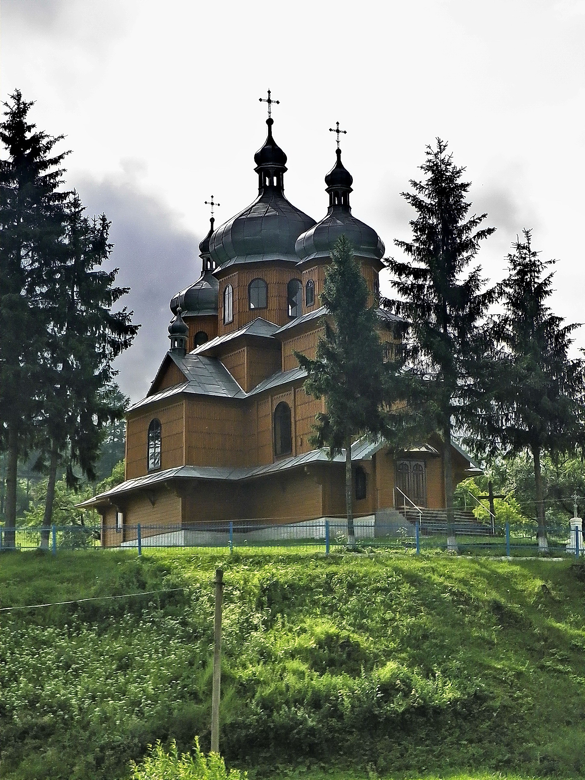 Церква Св. Параскеви (дер.), Розгадів